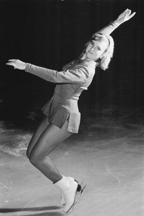 Beate Richter Zentralbild Studré 14.11.1964 Berlin: Internationaler Verbandspokal des DELV Die DDR-Läuferin Beate Richter vom TSC Berlin.